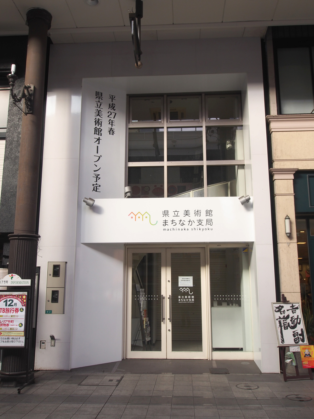 大分県立美術館まちなか支局（大分県大分市）